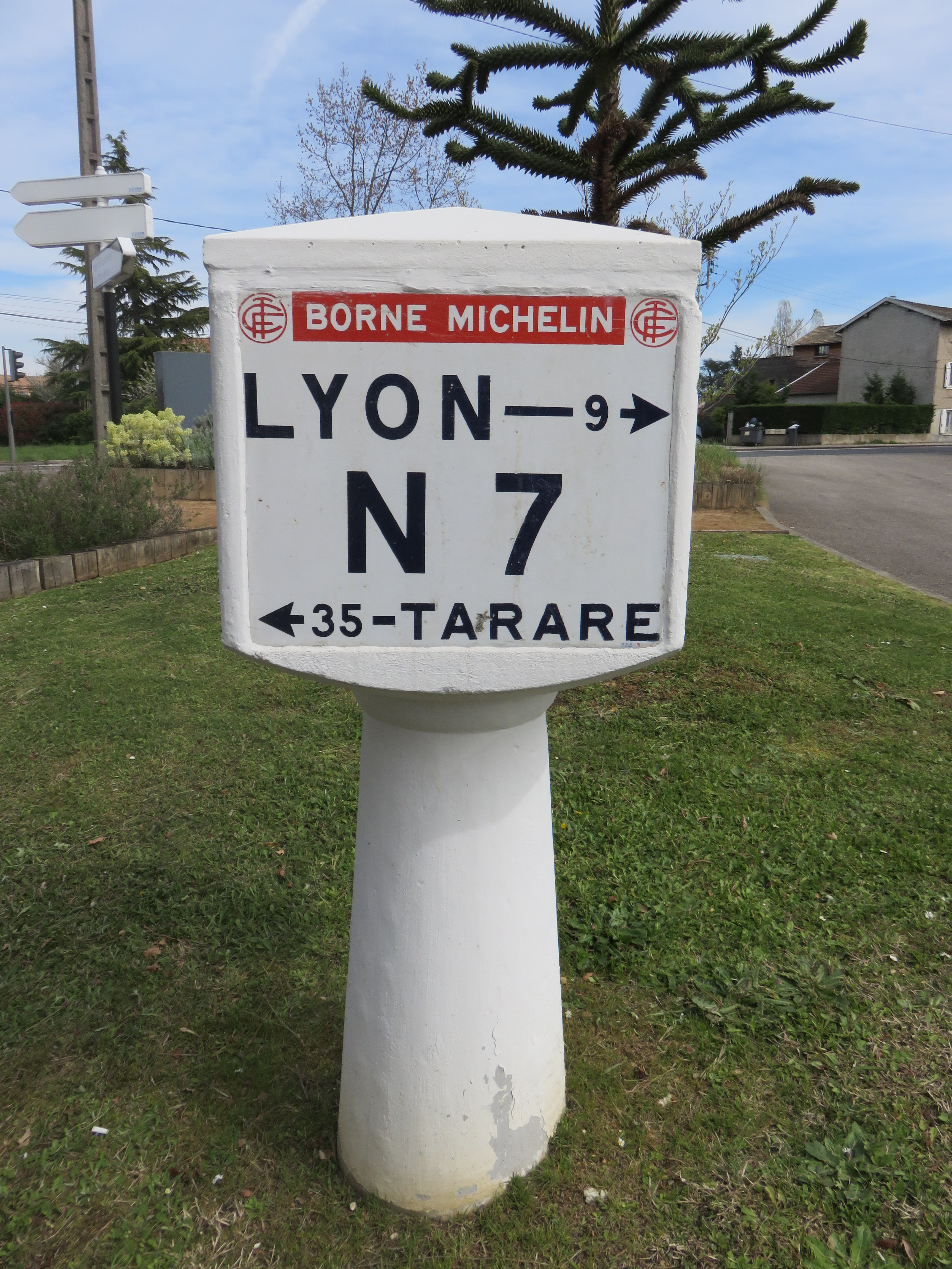 Ancienne borne Michelin sur la route nationale 7 à Charbonnières-les-Bains (Rhône, France).